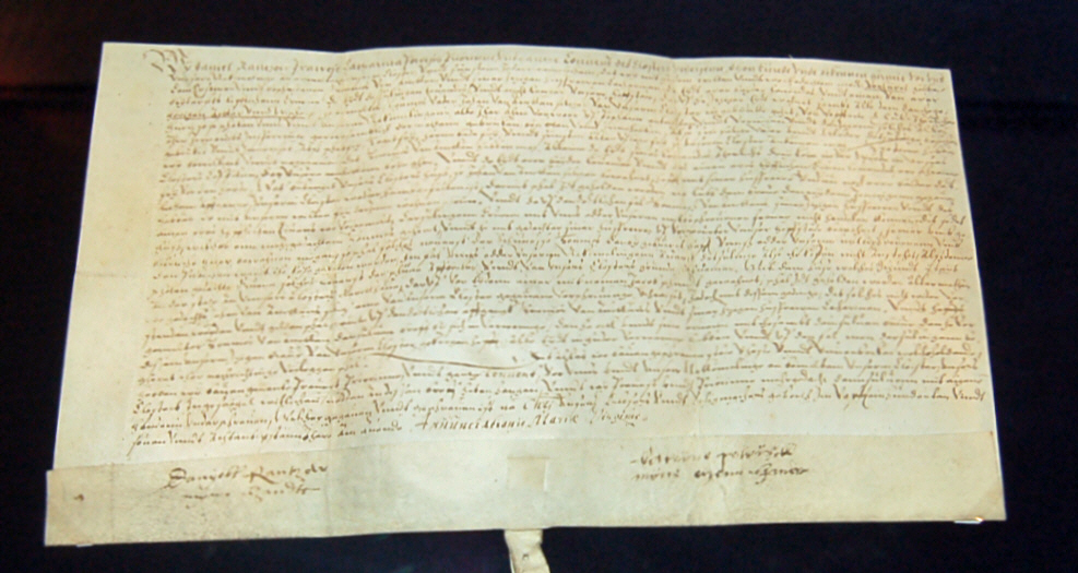 Hausurkunde des Klosterprobst Daniel Rantzau und Priörin Catharina Pogwisch. In diesem Hausbrief bestätigen sie einen Grundstücksverkauf. Urkunde aus dem Jahre 1587, niederdeutsch abgefasst. Fotografiert im Museum Langes Tannen in Uetersen.